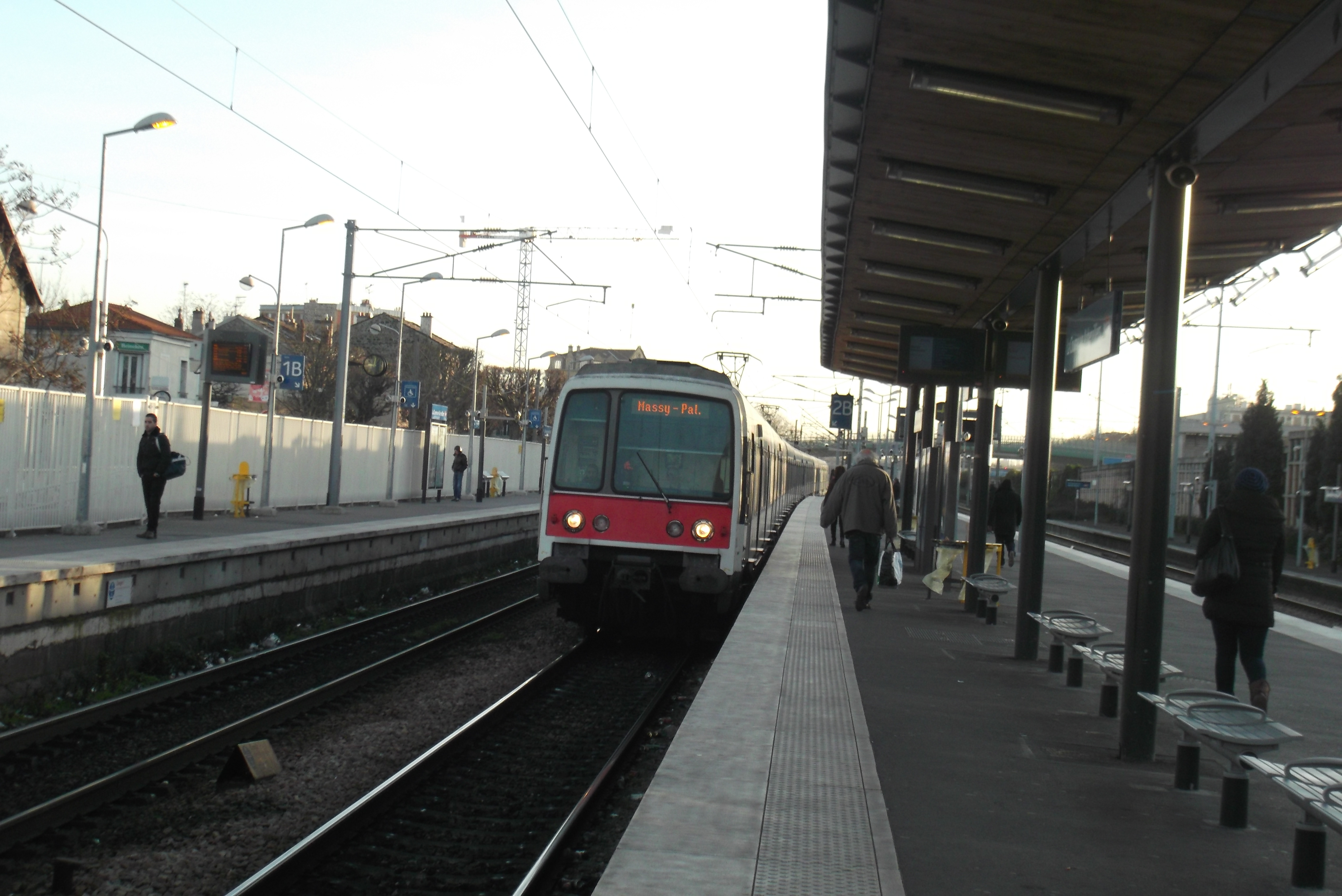 MI84 RATP en gare de La Courneuve - Aubervilliers, Seine-Saint-Denis, France.